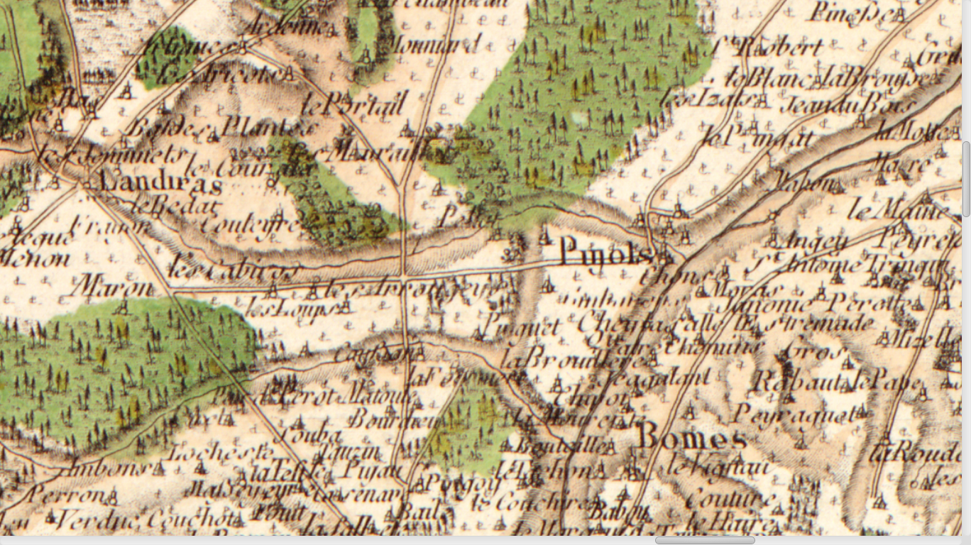 Carte de Cassini n°105 (Gironde, zoom sur Pujols-sur-Ciron), 1756.